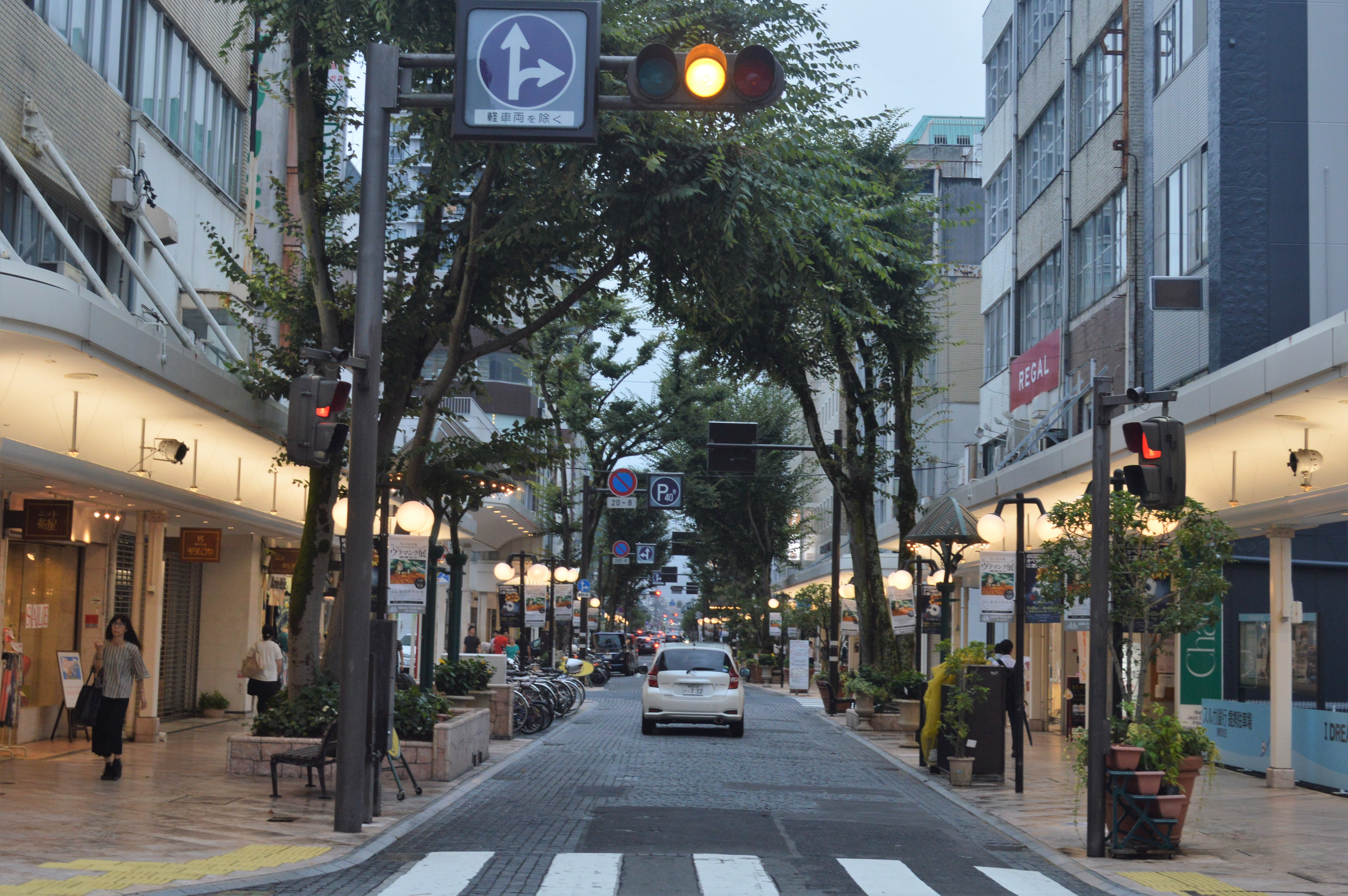 静岡市の七間町通り。